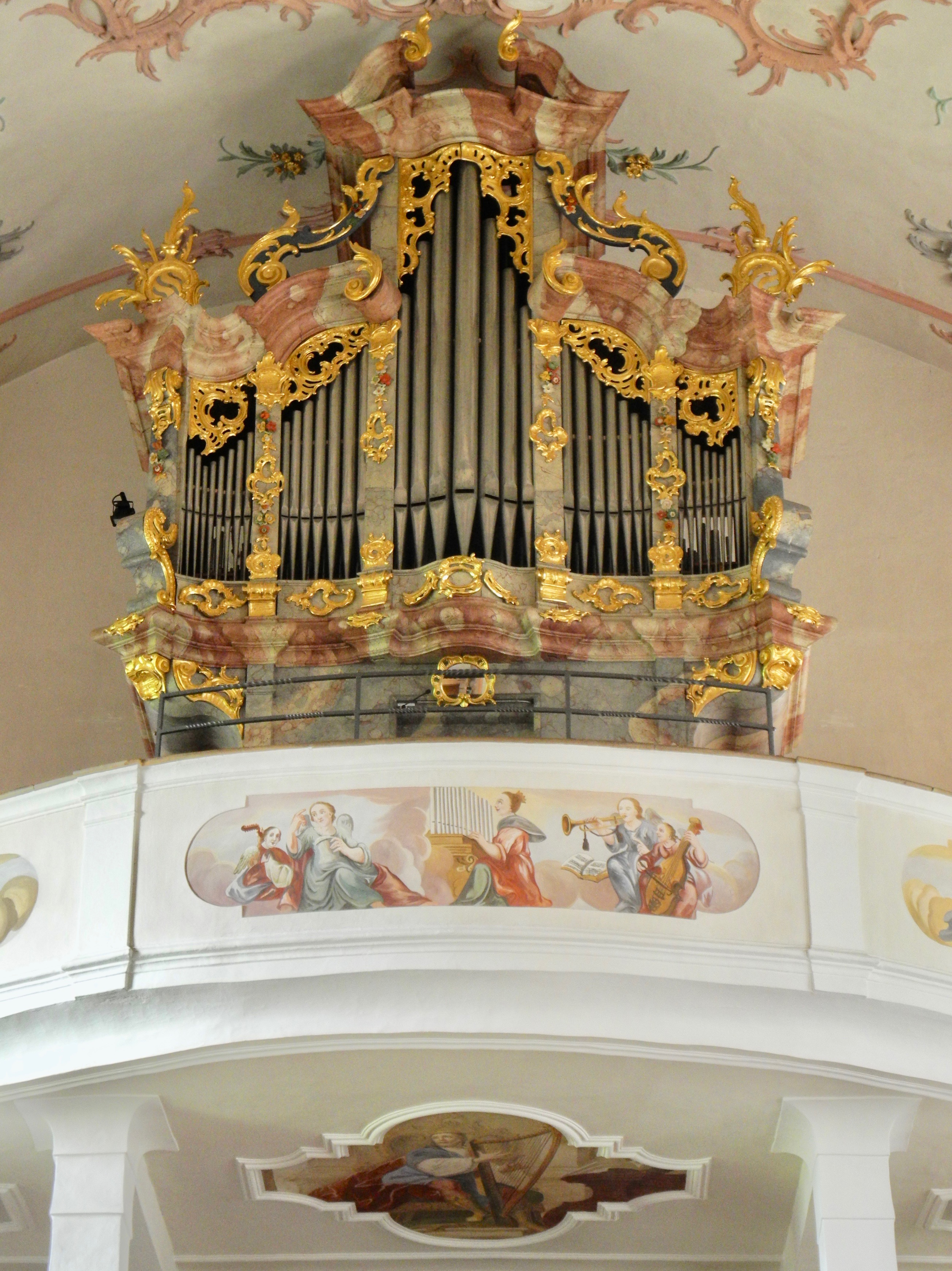 Die größte und besterhaltene Funtsch-Orgel